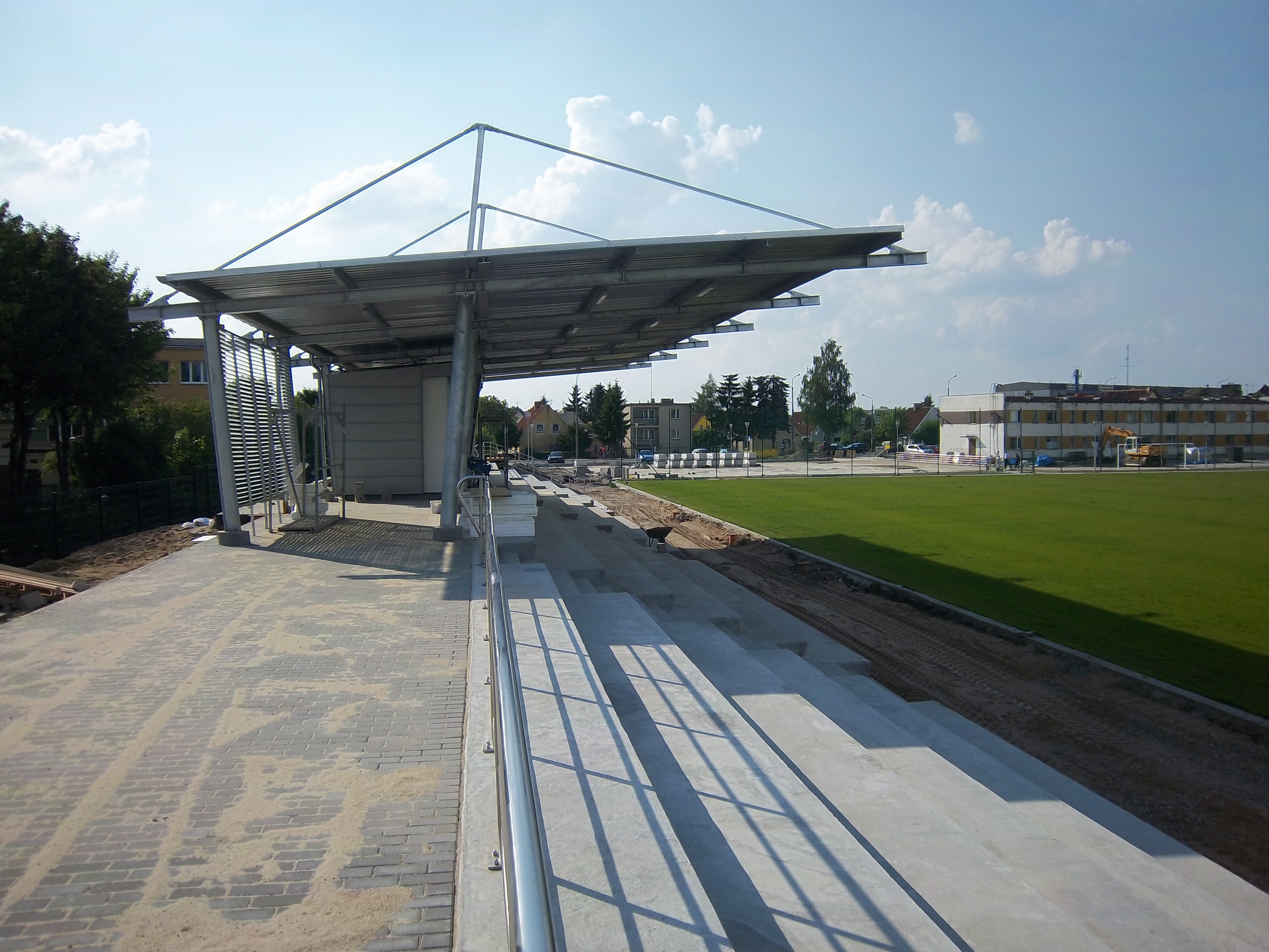 Trybuna kryta Ośrodka treningowego Olimpii Elbląg "Skrzydlata" (22 maja 2011)